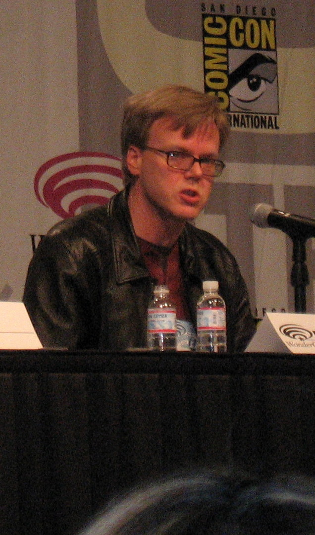 Bruce Timm al Wondercon 2007